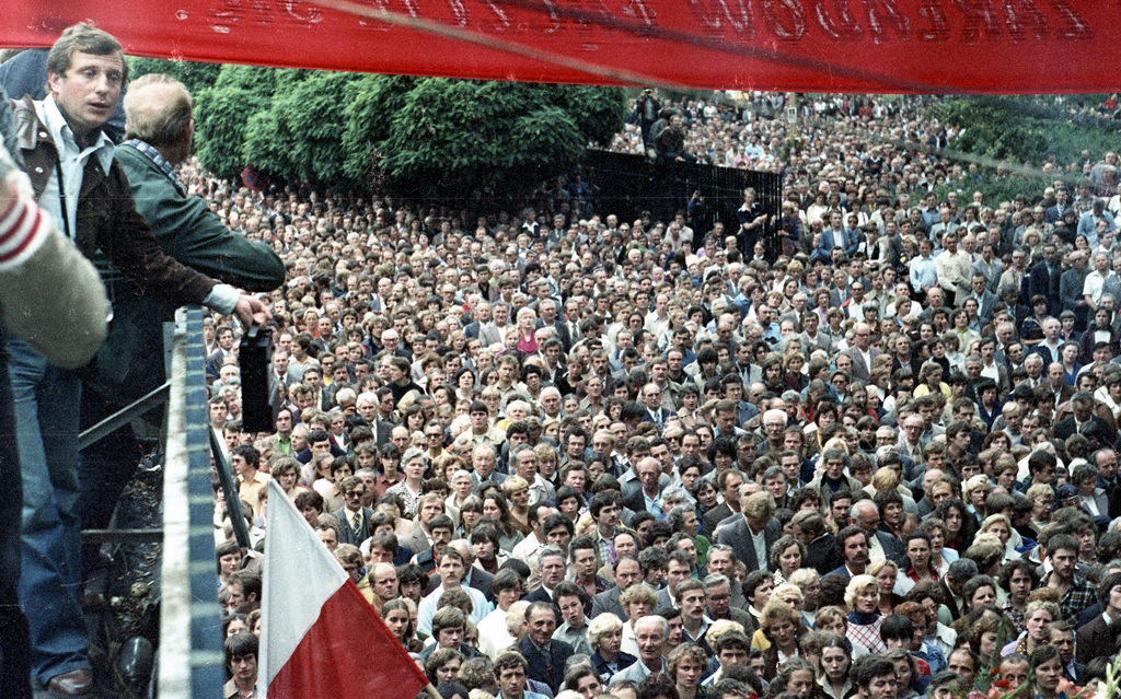 Tłum mieszkańców Gdańska zgromadzony przed Bramą nr 2 Stoczni Gdańskiej im. Lenina